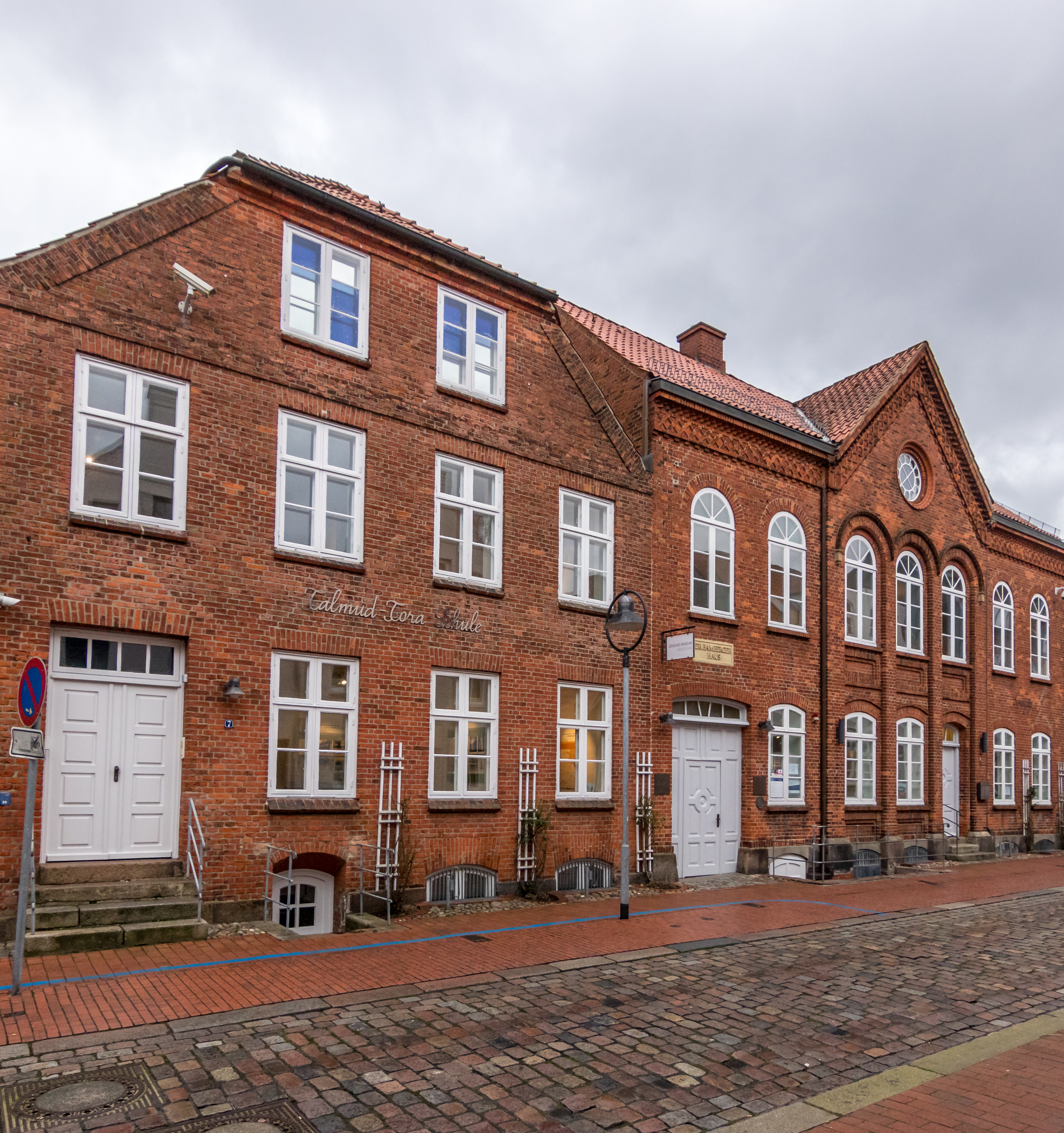 Jüdisches Museum Rendsburg - Gesamtkomplex aus Schule und Dr.-Bamberger-Haus